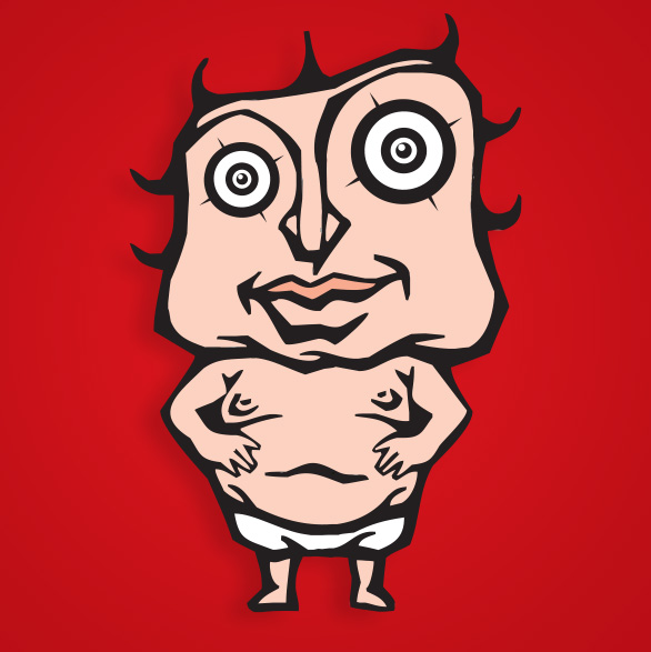 Hodokvasnik